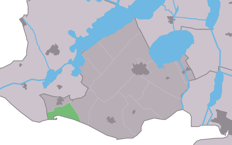 Kaartsje fan himrik fan Murns